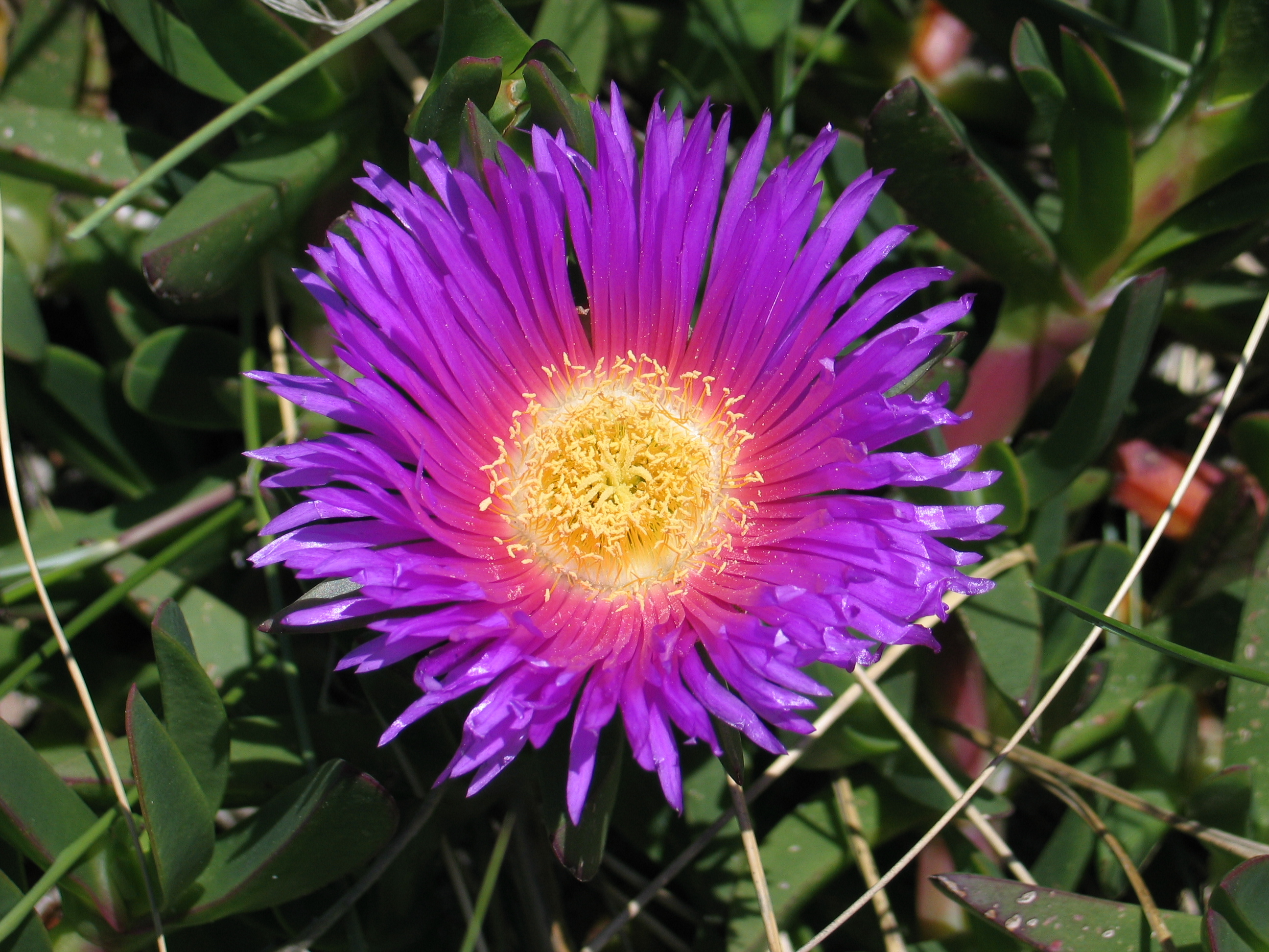 Flower of C. edulis, Vila Praia de Âncora, Portugal